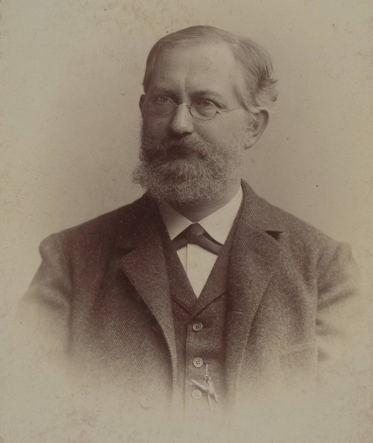 Eugen Askenasy, Botaniker, 1881–1903 Professor in Heidelberg